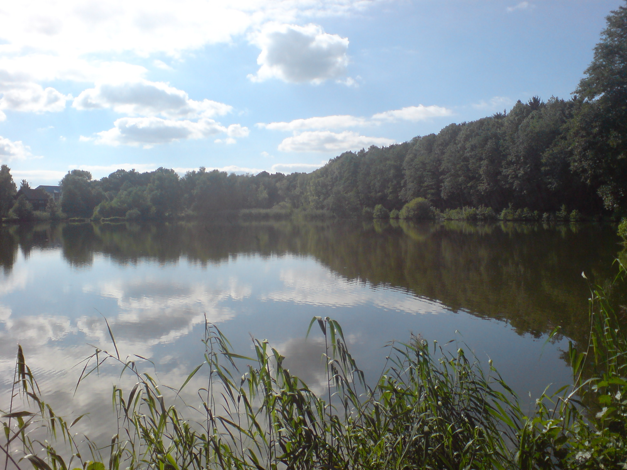 Der Mohrmühlweiher, umgangssprachlich Motschweiher genannt bei der Mohrmühle (Motschmühle) in Waldmohr.